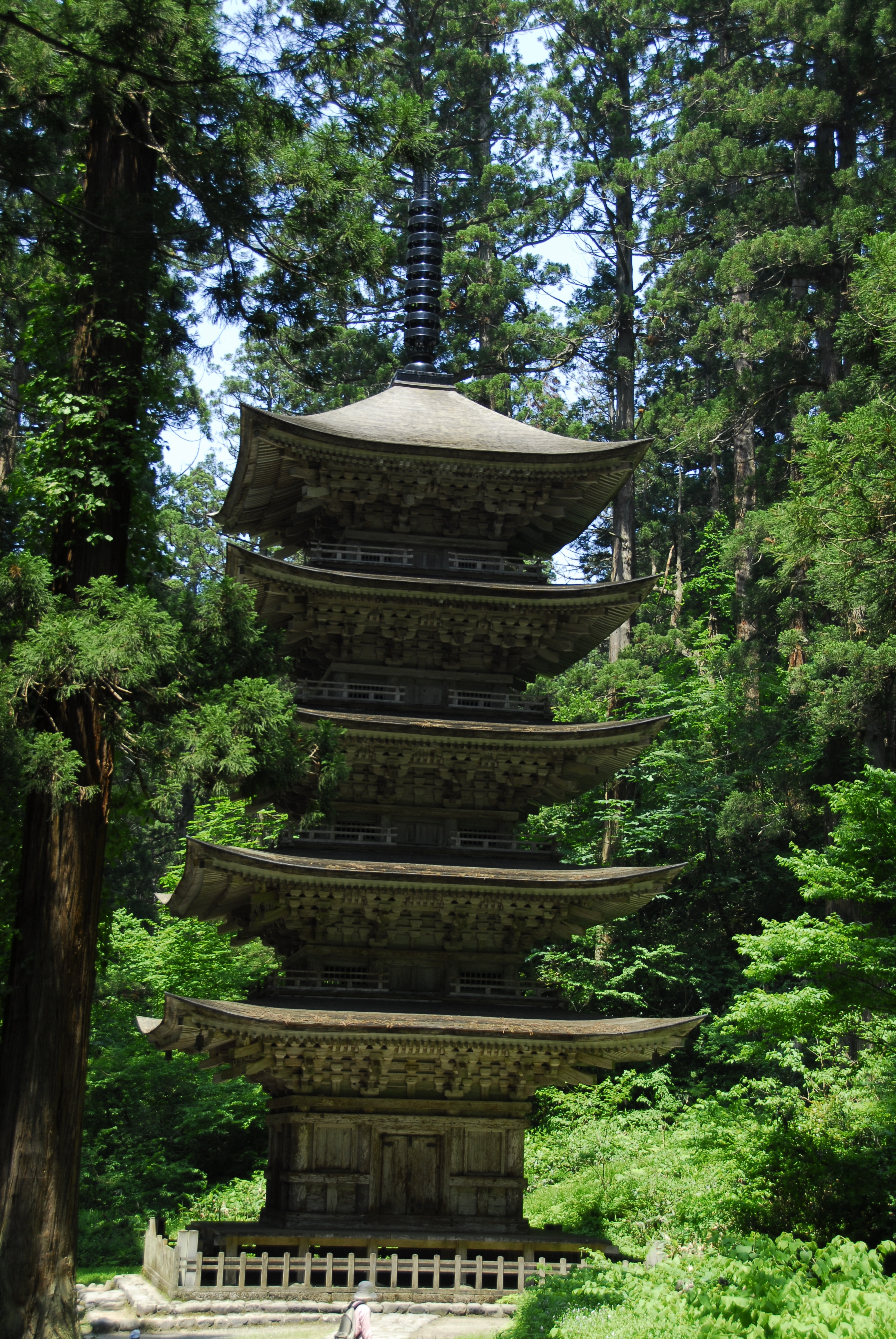 Mt Haguro 5 storied pagoda